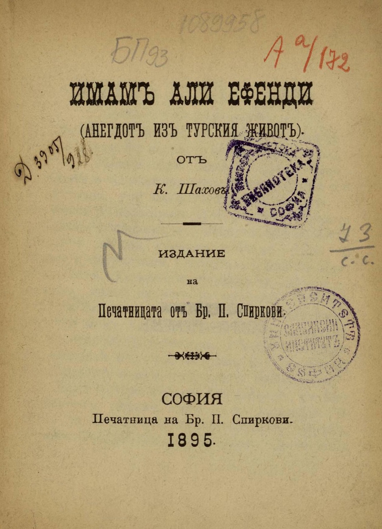 Титулна страница на „Имам Али Ефенди“ от Коста Шахов